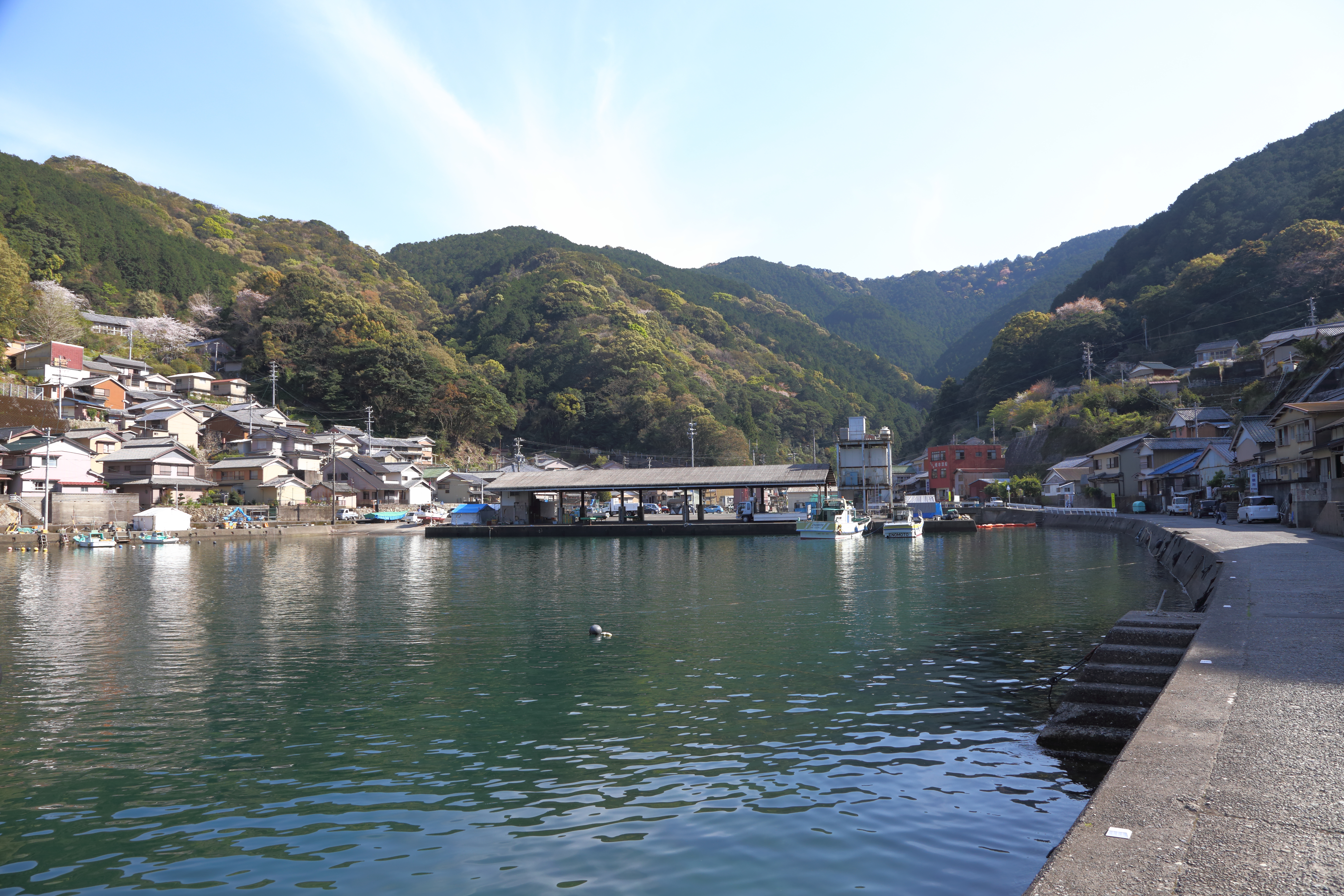 三重県尾鷲市梶賀町